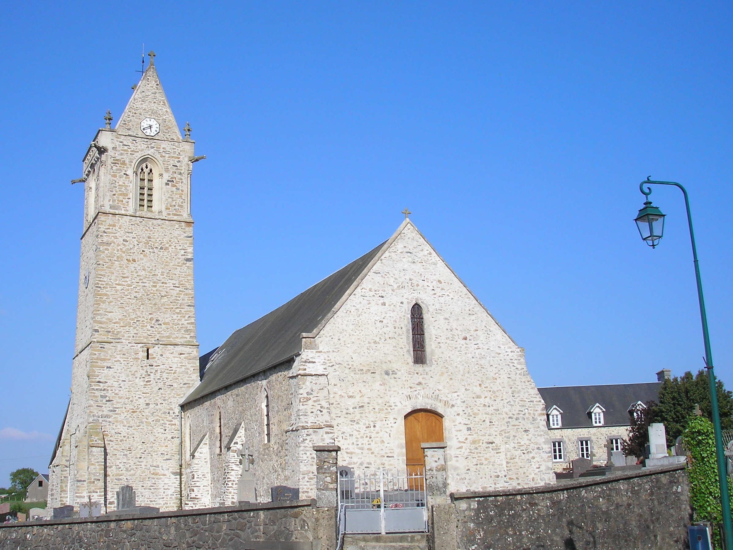 Hauteville-la-Guichard (Normandie, France). L'église de l'Assomption-de-Notre-Dame.